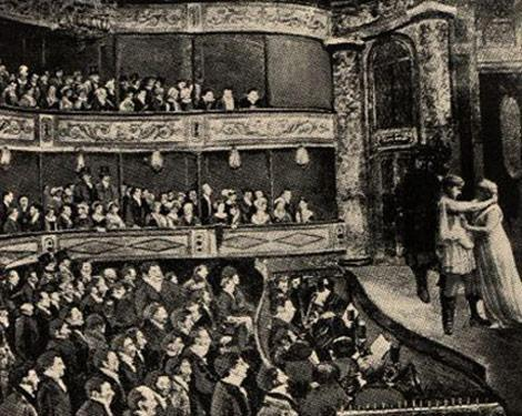 La première véritable salle de spectacle et de théâtre est le Théâtre Royal construit en 1825 sur la rue Saint-Paul par le brasseur John Molson. Il est construit à l'image des théâtres américains. Il s'agit d'un bâtiment de deux étages. Il contient 1 500 sièges. Le coût: 30 000$. C'était la première salle au Canada consacrée exclusivement aux arts d'interprétation, surtout au théâtre. Le théâtre fut démoli en 1844 pour faire place au marché Bonsecours. (Source: Canadian Theatre Encyclopedia)